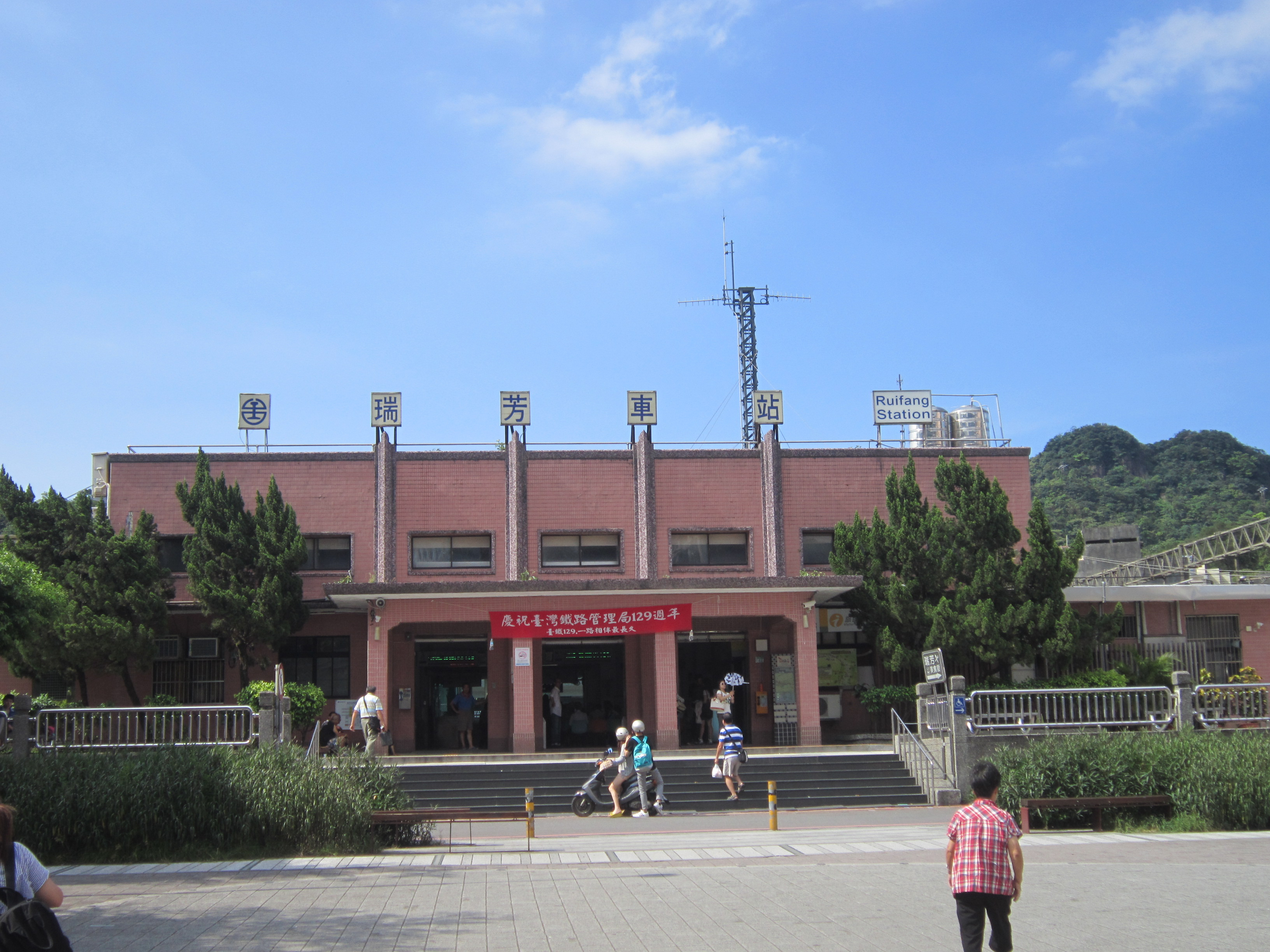 中文（台灣）: 臺灣鐵路管理局瑞芳車站前廣場。